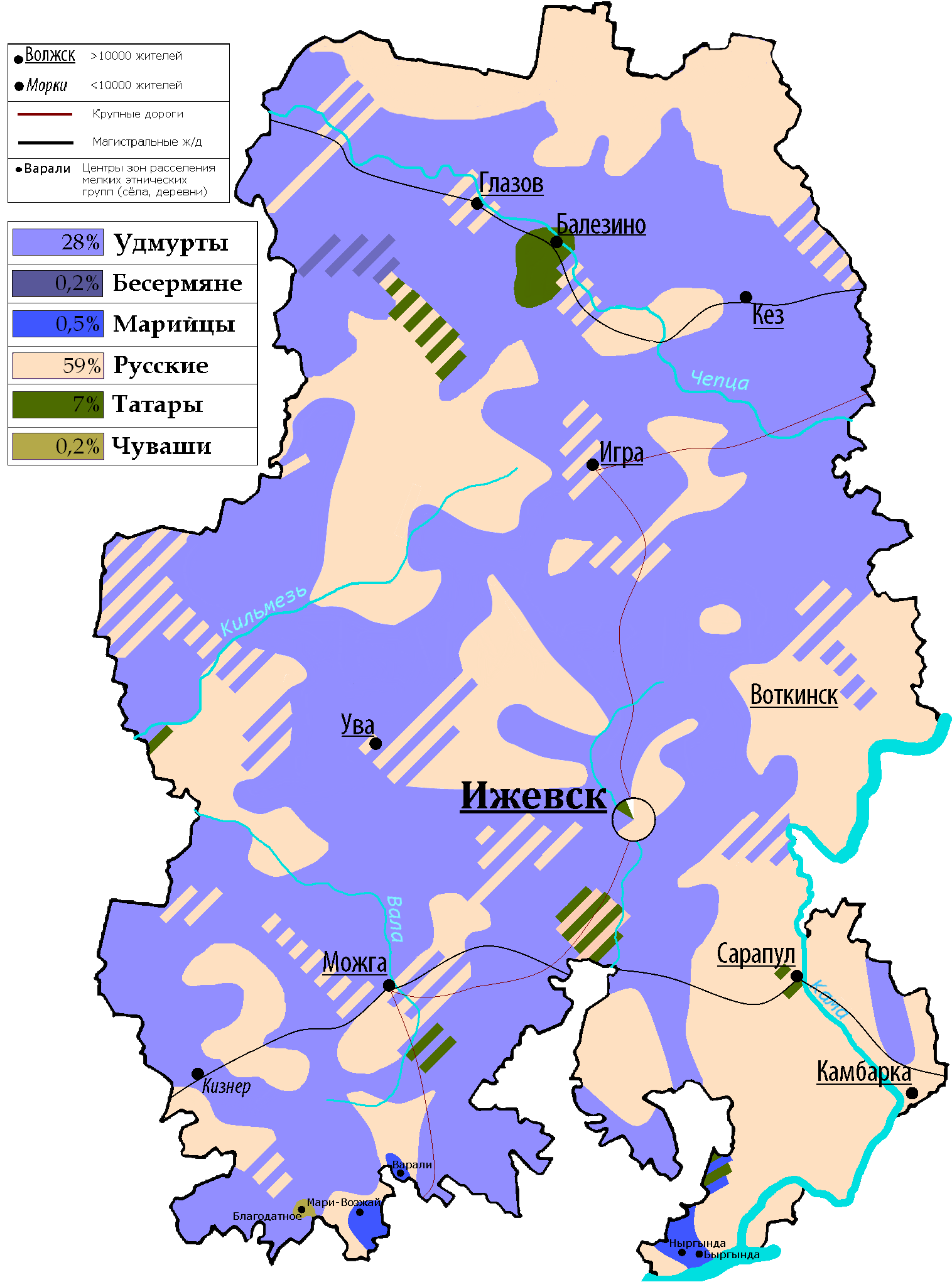 Этническая карта расселения народов Удмуртии